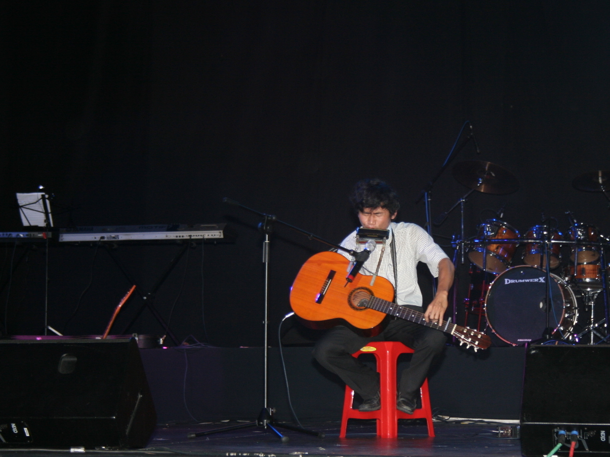 Quái kiệt Nguyễn Thế Vinh trong đêm Văn nghệ từ thiện tại Festival Huế vi:2008.